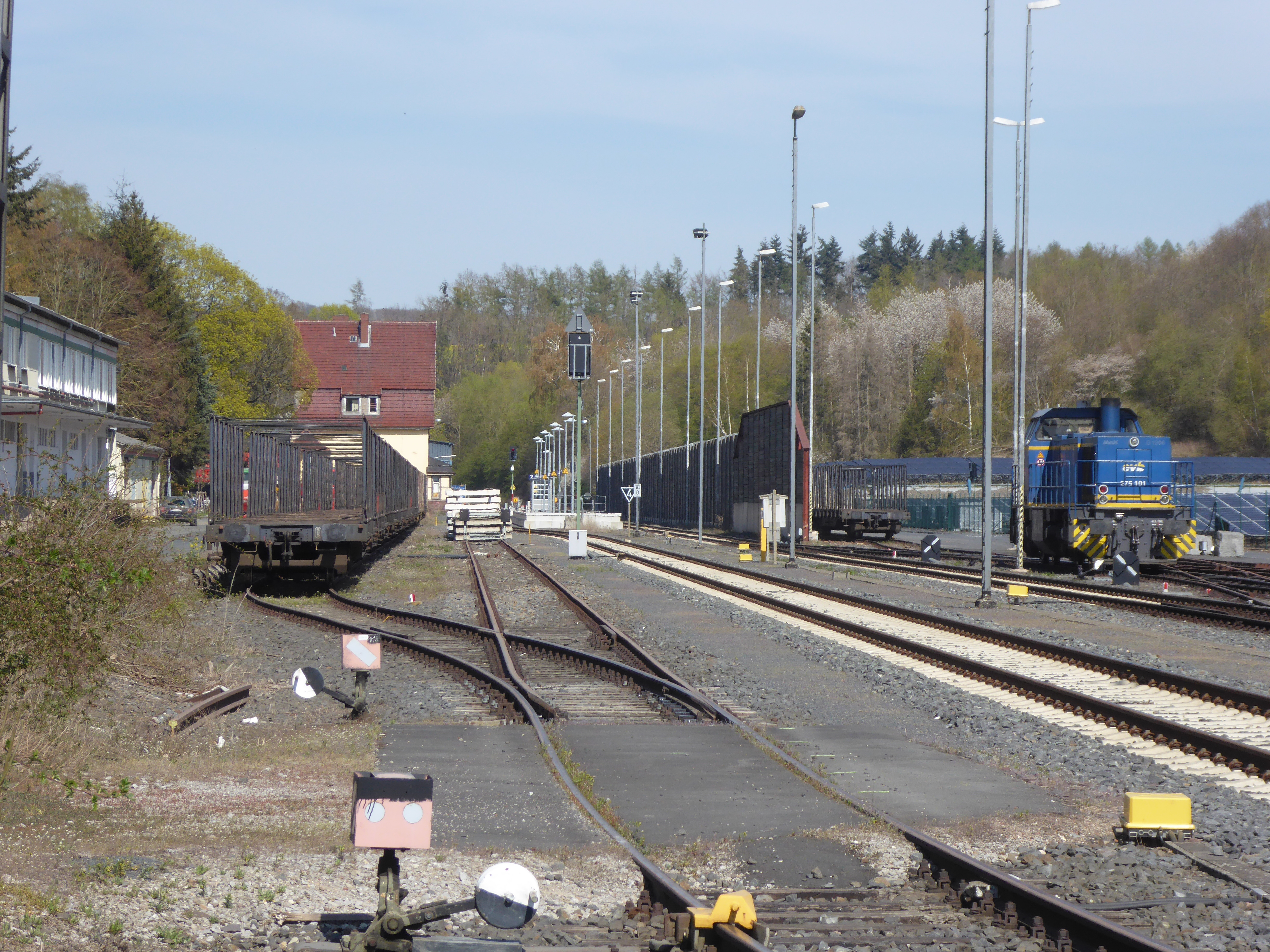 Blick von der Ladestraße auf den Bahnhof in Adelebsen. Es gibt nur noch einen erhöhten Mittelbahnsteig. Im April 2020 wird Holz verladen, dazu warten Rungenwagen und eine EVB-Lok auf Arbeit.